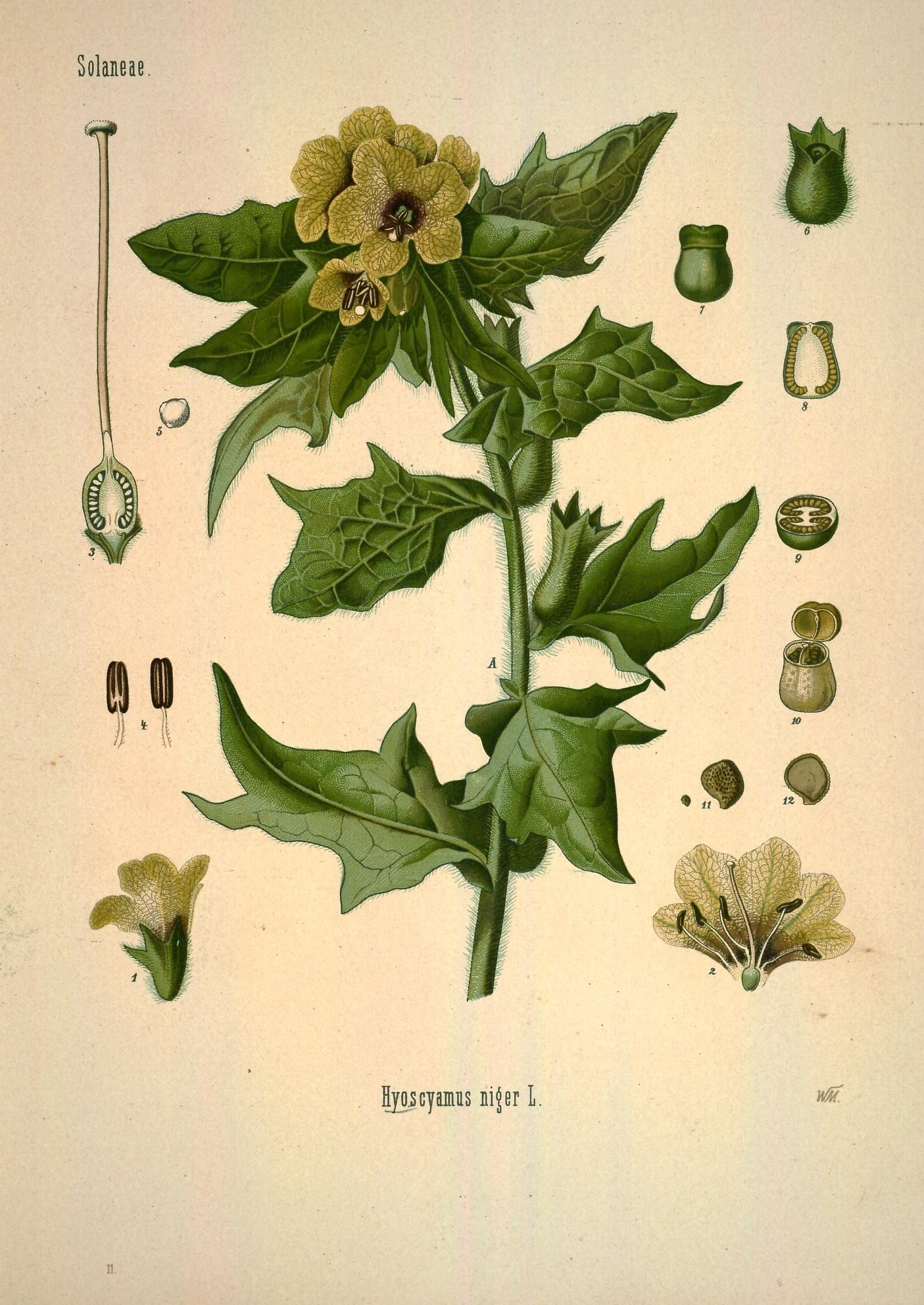 Schwarzes Bilsenkraut. A oberer Theil der Pflanze in natürl. Grösse; 1 Kelch mit Blumenkrone, desgl.; 2 aufgeschnittene und ausgebreitete Blumenkrone, desgl.; 3 Fruchtknoten mit Griffel und Narbe, vergrössert; 4 Staubgefässe, desgl.; 5 Pollenkorn, desgl.; 6 Frucht mit Fruchtkelch, desgl.; 7 Frucht mit geschlossenem Deckel, desgl.; 8 dieselbe im Längsschnitt, desgl.; 9 dieselbe im Querschnitt, desgl.; 10 dieselbe mit geöffnetem Deckel, desgl.; 11 Same, natürl. Grösse und vergrössert; 12 derselbe zerschnitten, vergrössert.